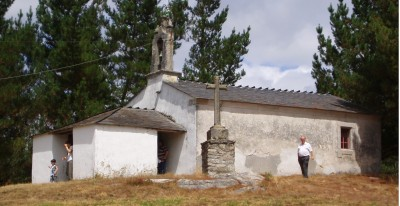 Capilla de San Roque en Carballido, municipio de Vilalba (Lugo, España)